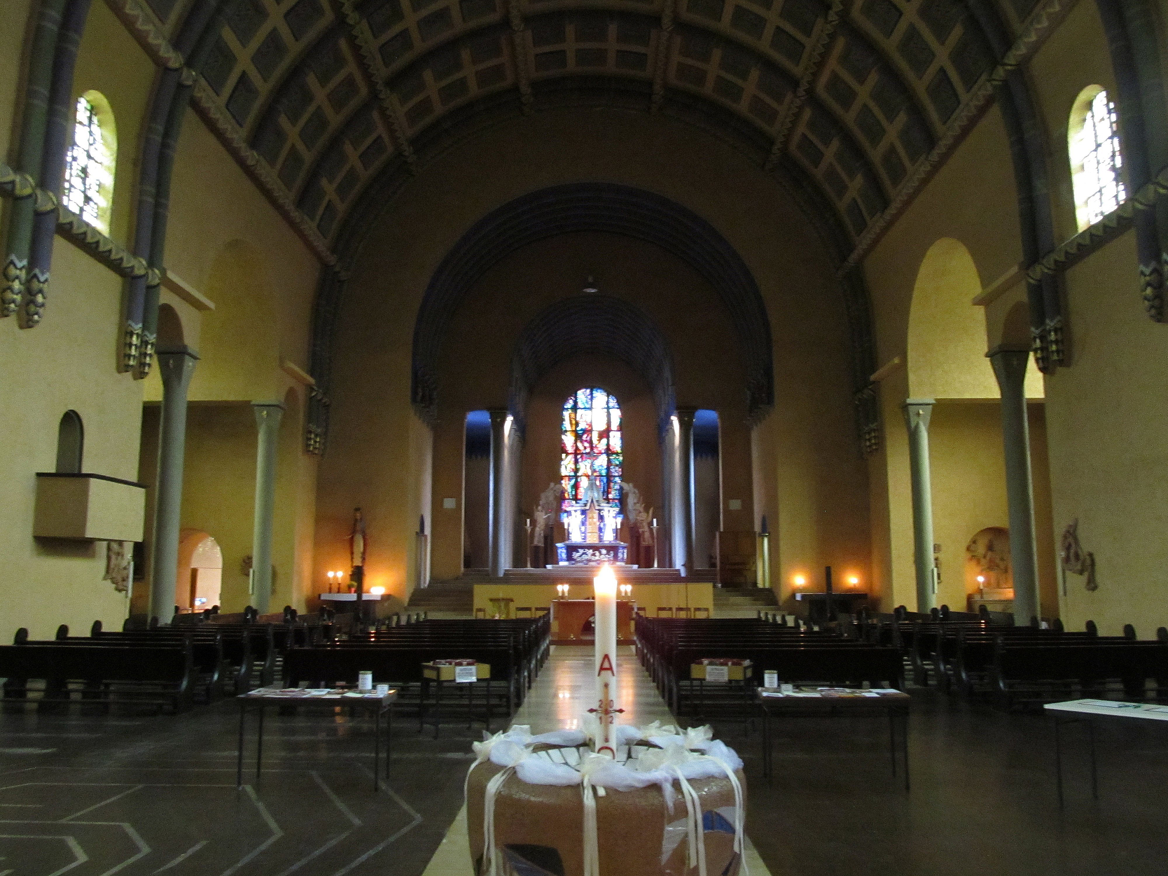 Blick ins Innere der katholischen Kirche St. Michael in Saarbrücken, Saarland